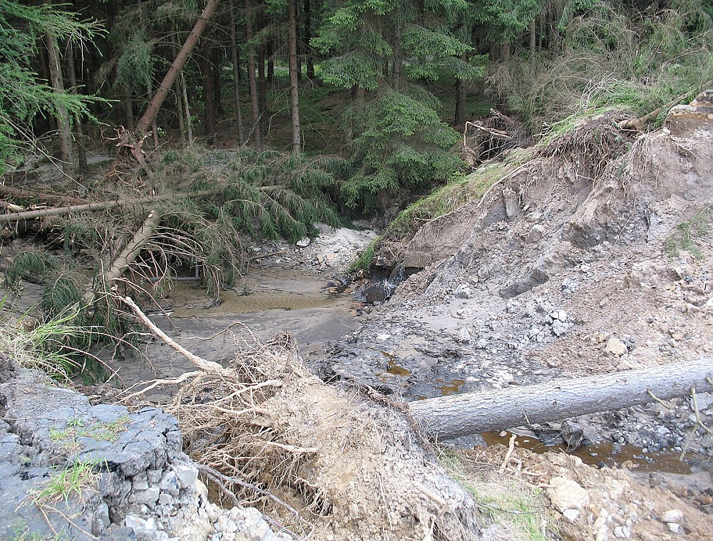 Vodou vyvrácené stromy pod hrází - srpen 2010